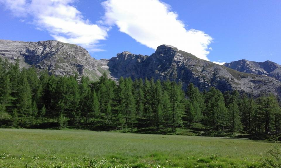 Alte Valli Anzasca, Antrona e Bognanco (Q47087434)